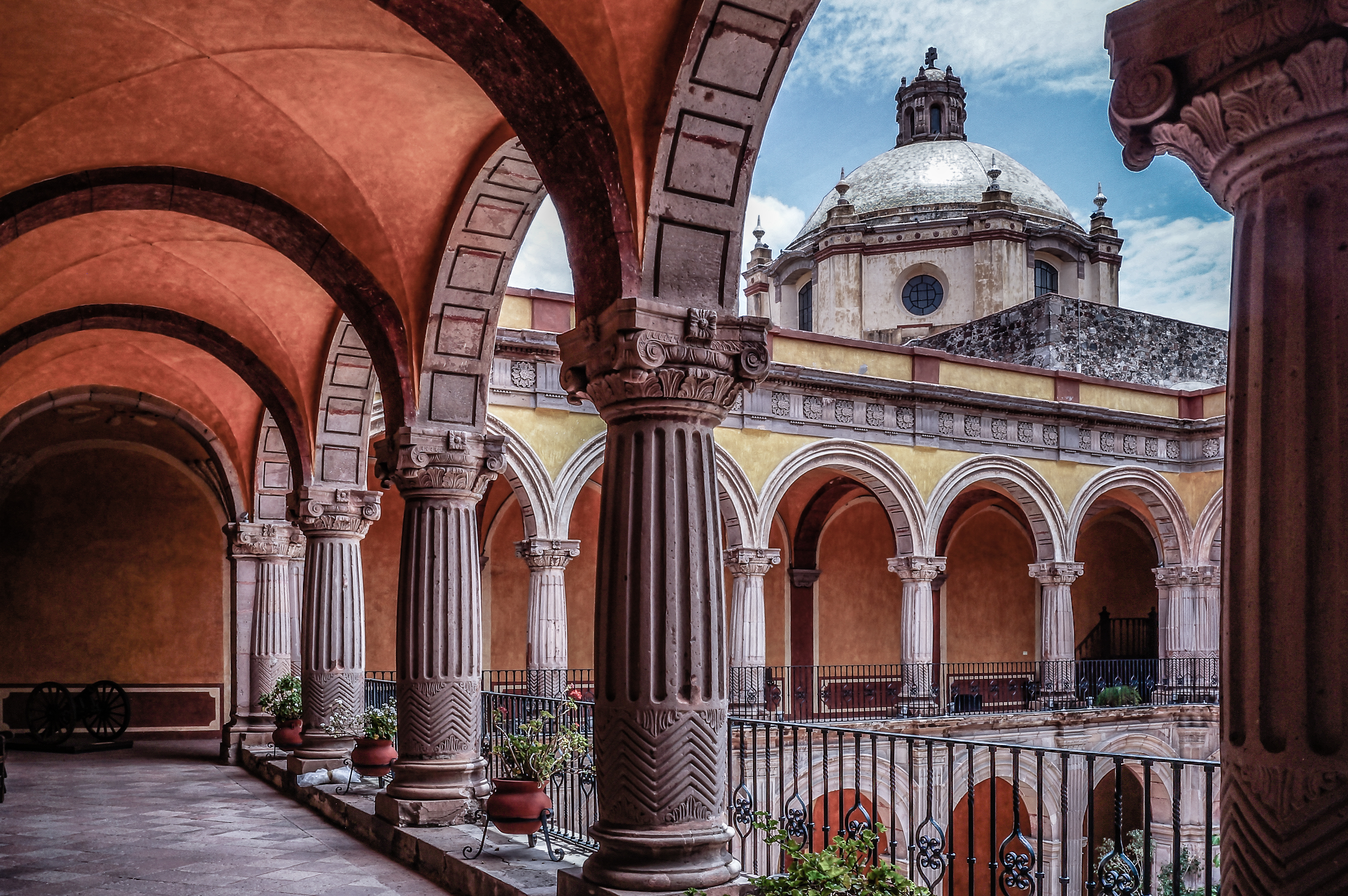 Una de las construcciones virreinales más significativas de México